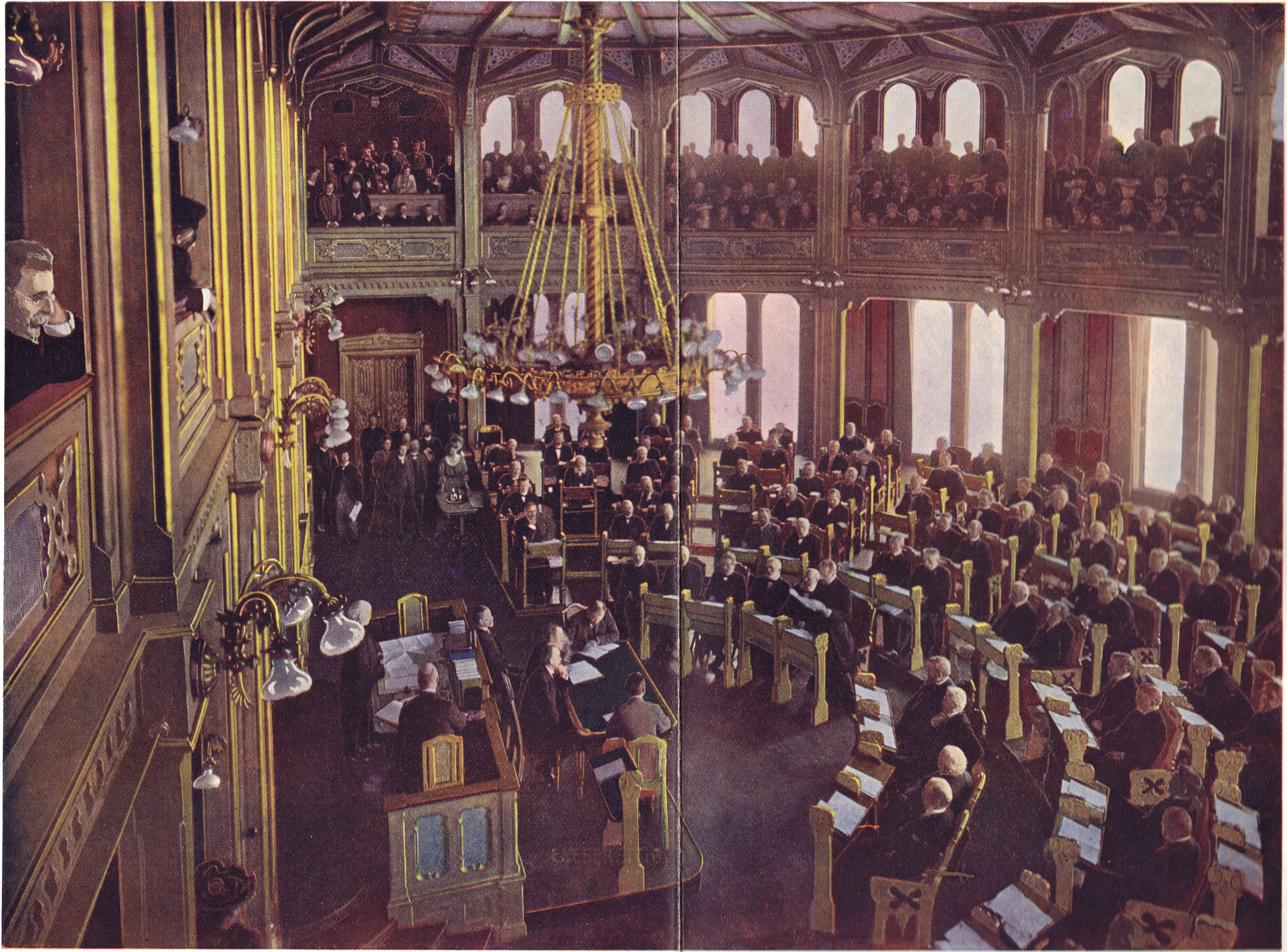 Stortingets møte 7. juni 1905. Statsminister Michelsen oppleser regjeringens meddelelse. Fargelagt fotografi.